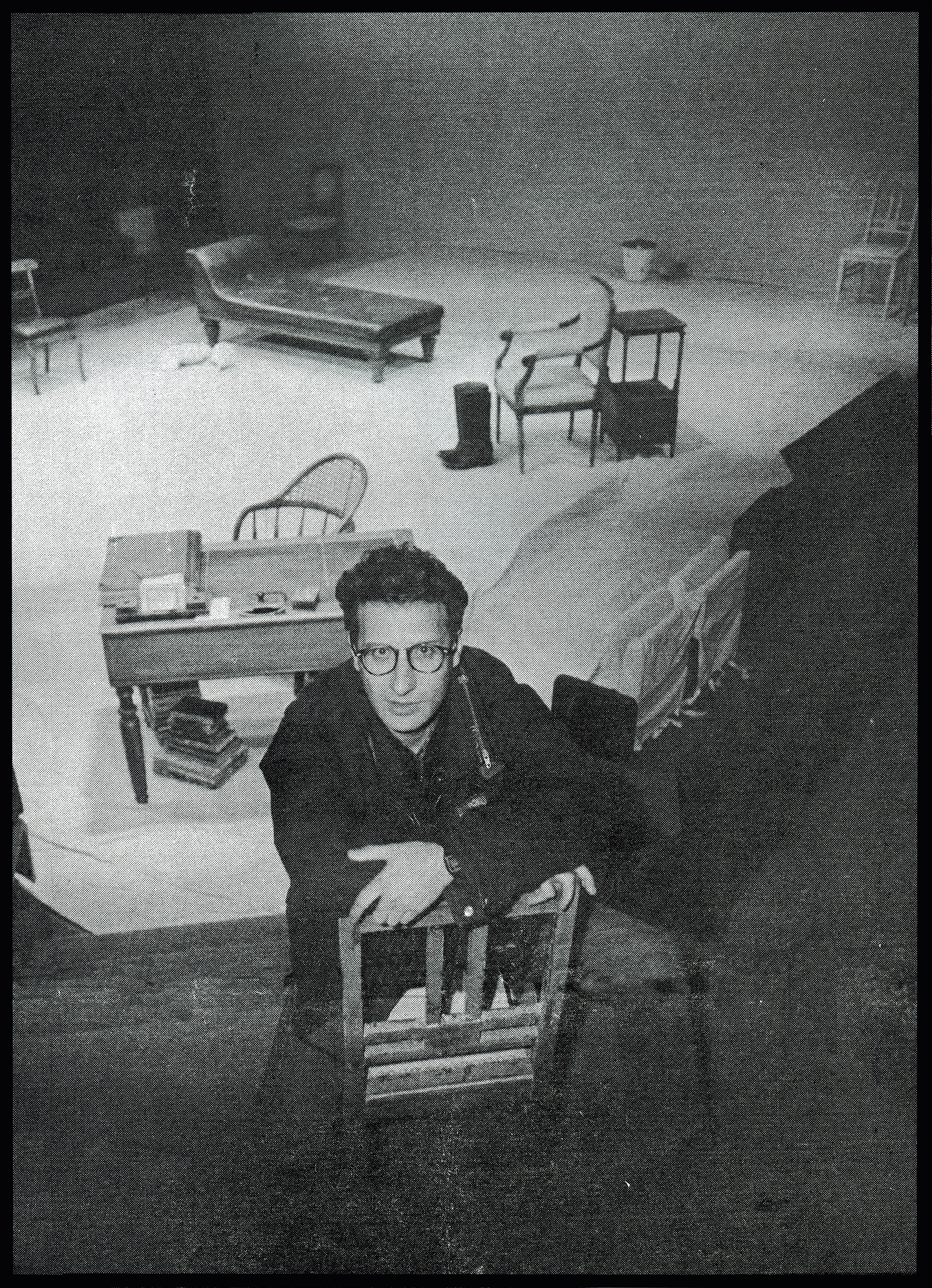 שטרנפלד- צילום-דניאל חכים הארץ